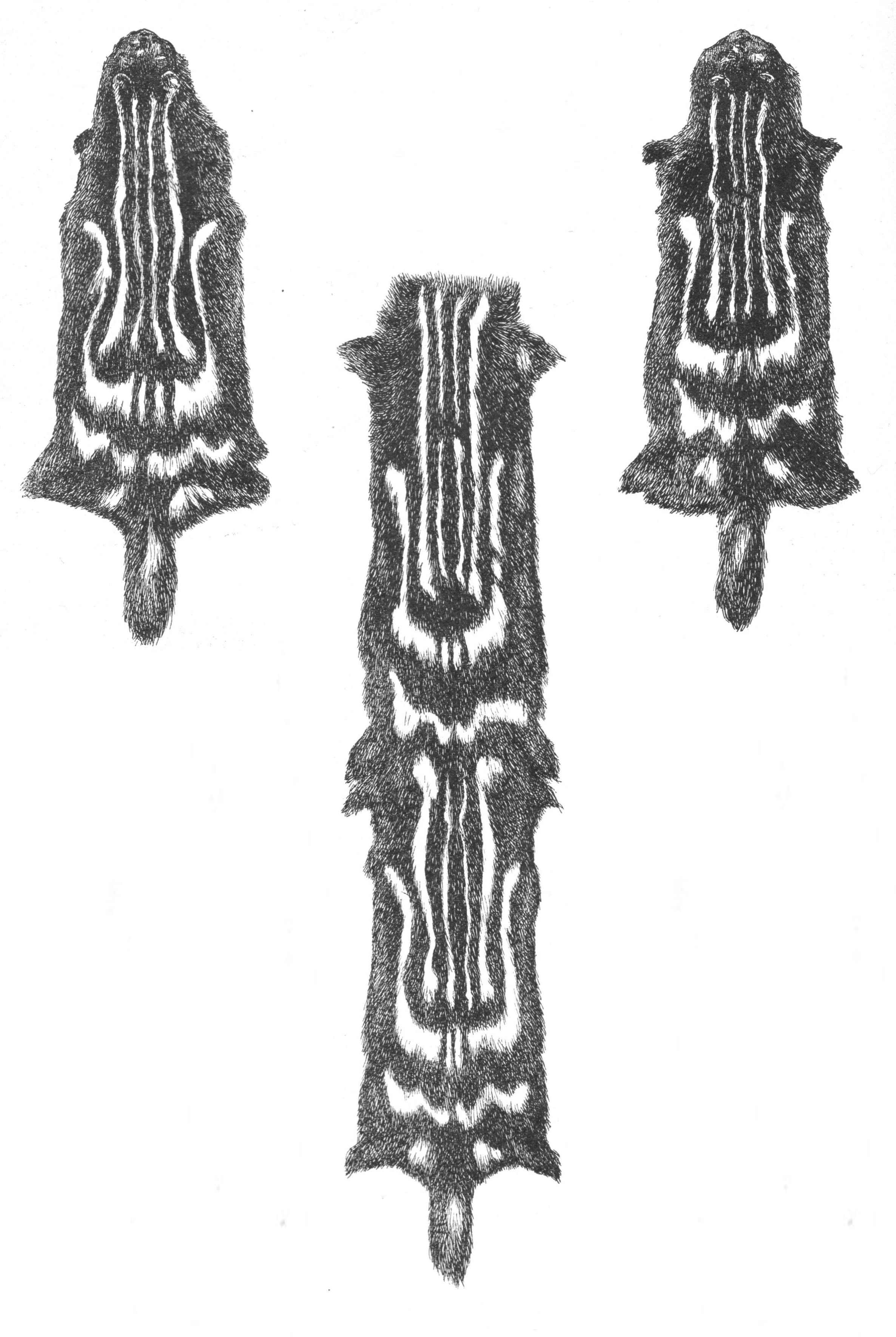 Die Verarbeitung von Lyraskunks-Fellen (Fleckenskunks). Kapitelüberschrift: Zoologischer Name: Mephitis interupta. Kürschnersprache: deutsch:Civet- oder Lyrakatze. Französisch: Civette. Englisch: Civet-cat.